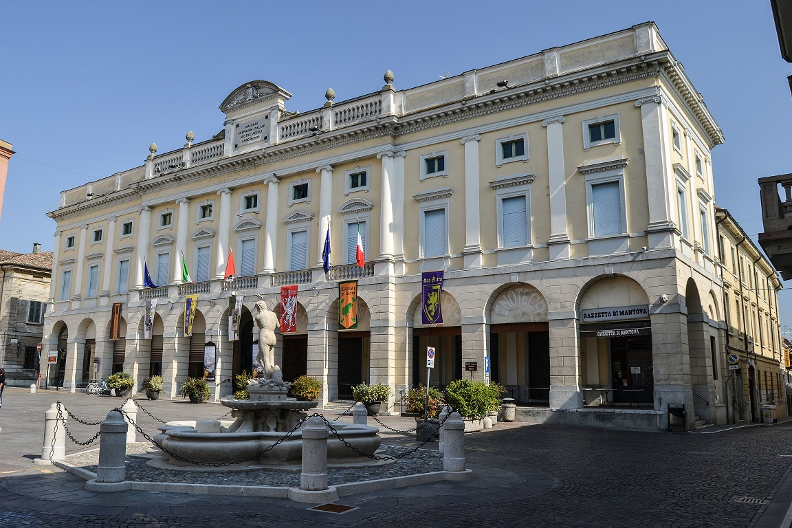 Monumento ai Caduti This is a photo of a monument which is part of cultural heritage of Italy.